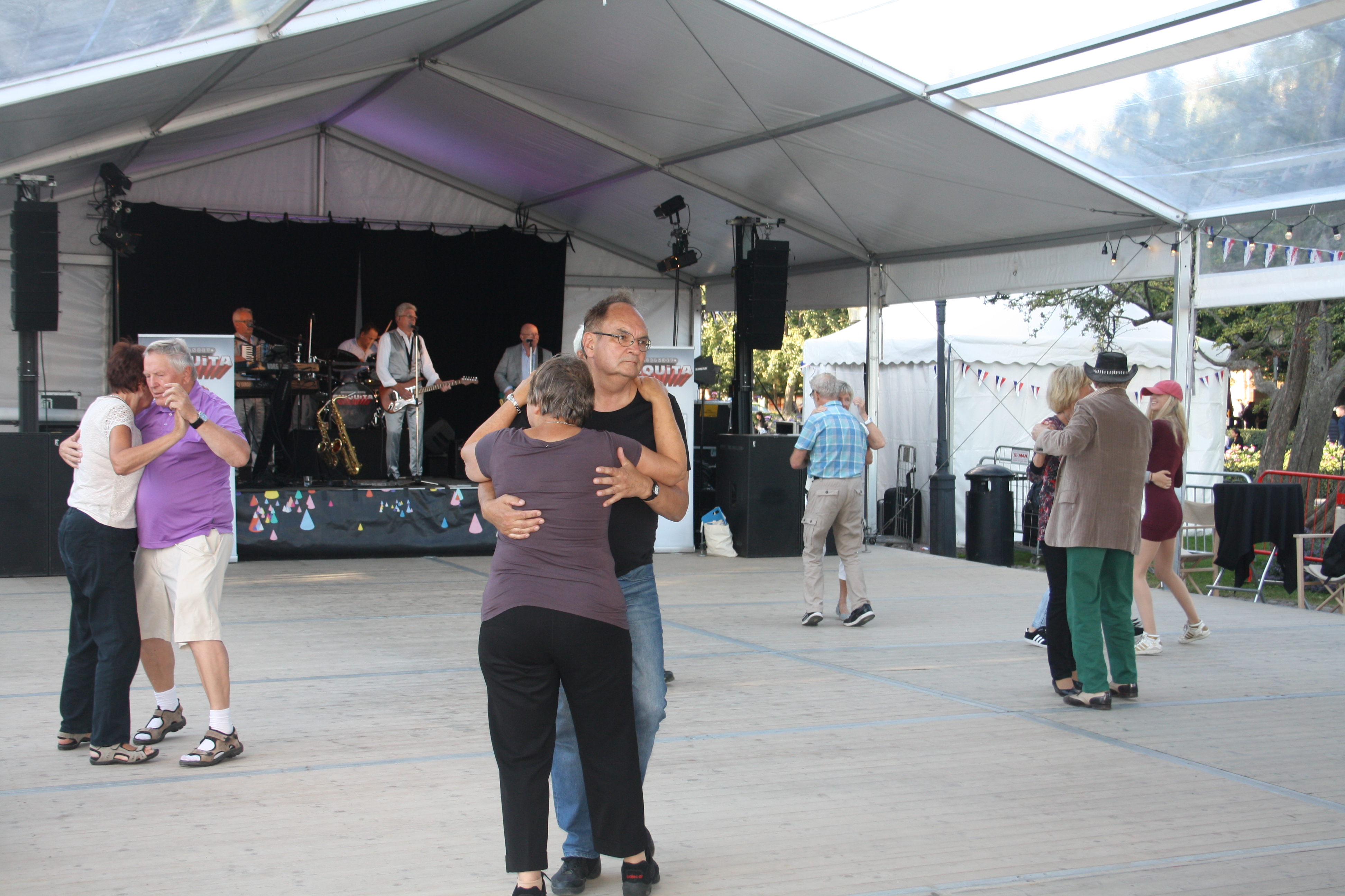 Chiquita i Kungsträdgården